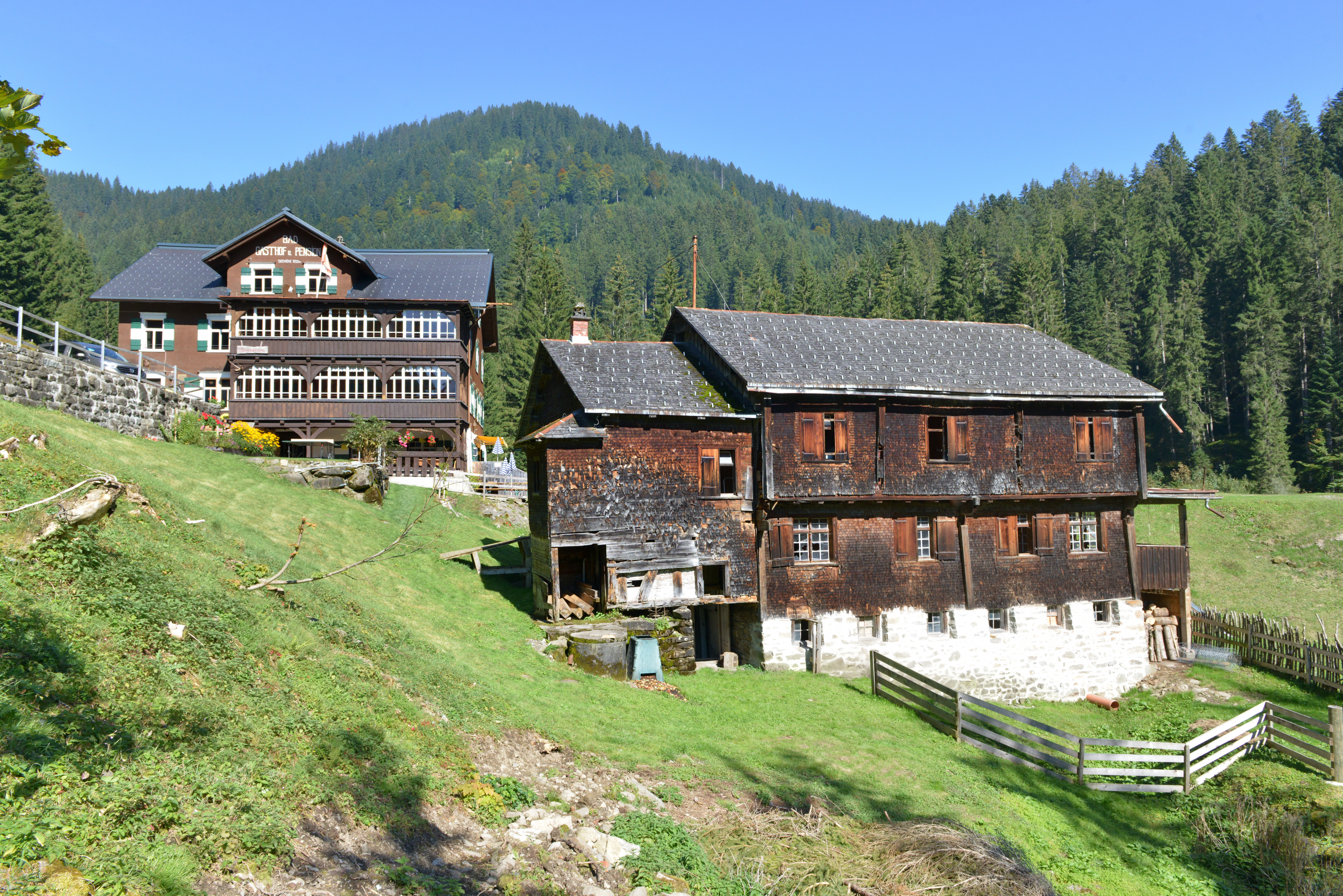 Gasthaus und Badehaus Bad Laterns in Laterns . Gasthaus Bad Laterns